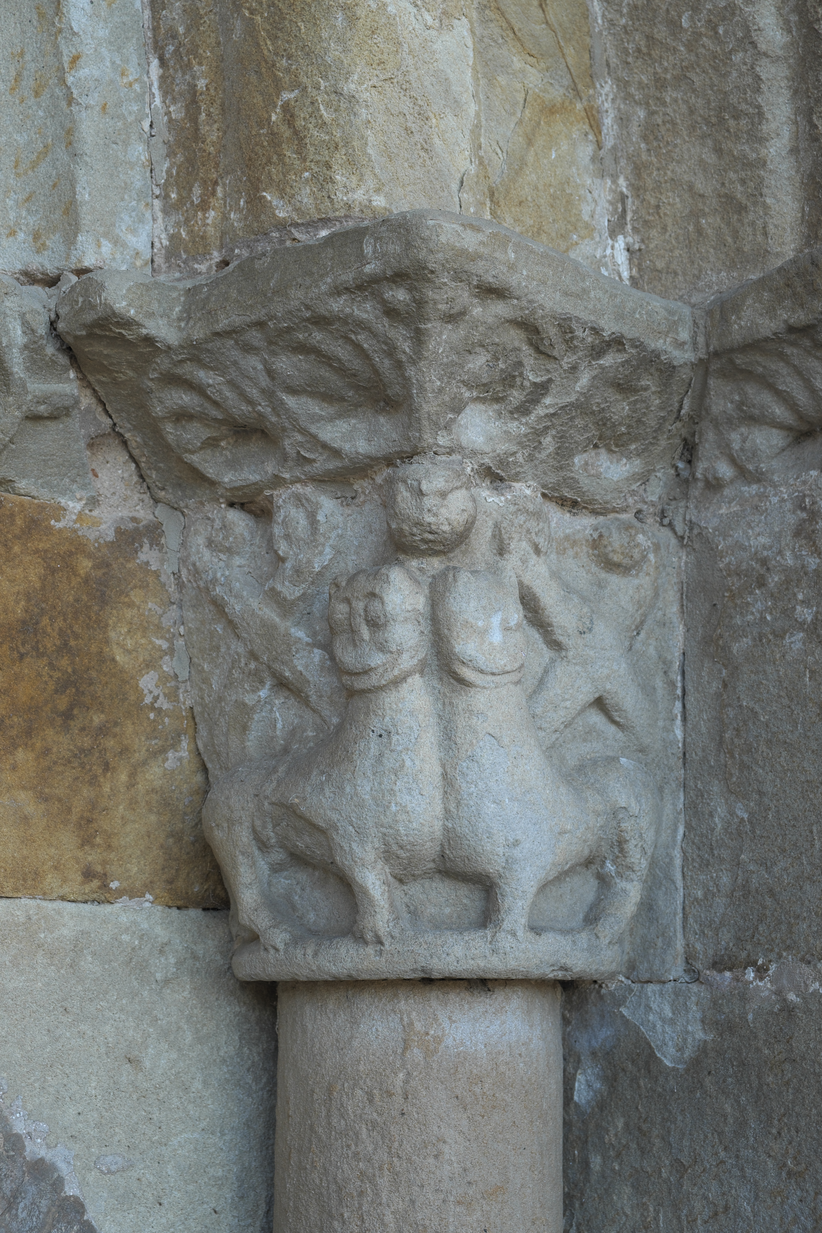 Ehemalige Benediktinerklosterkirche Colegiata de Santa Cruz in Castañeda in Kantabrien (Spanien), Kapitell des Portals